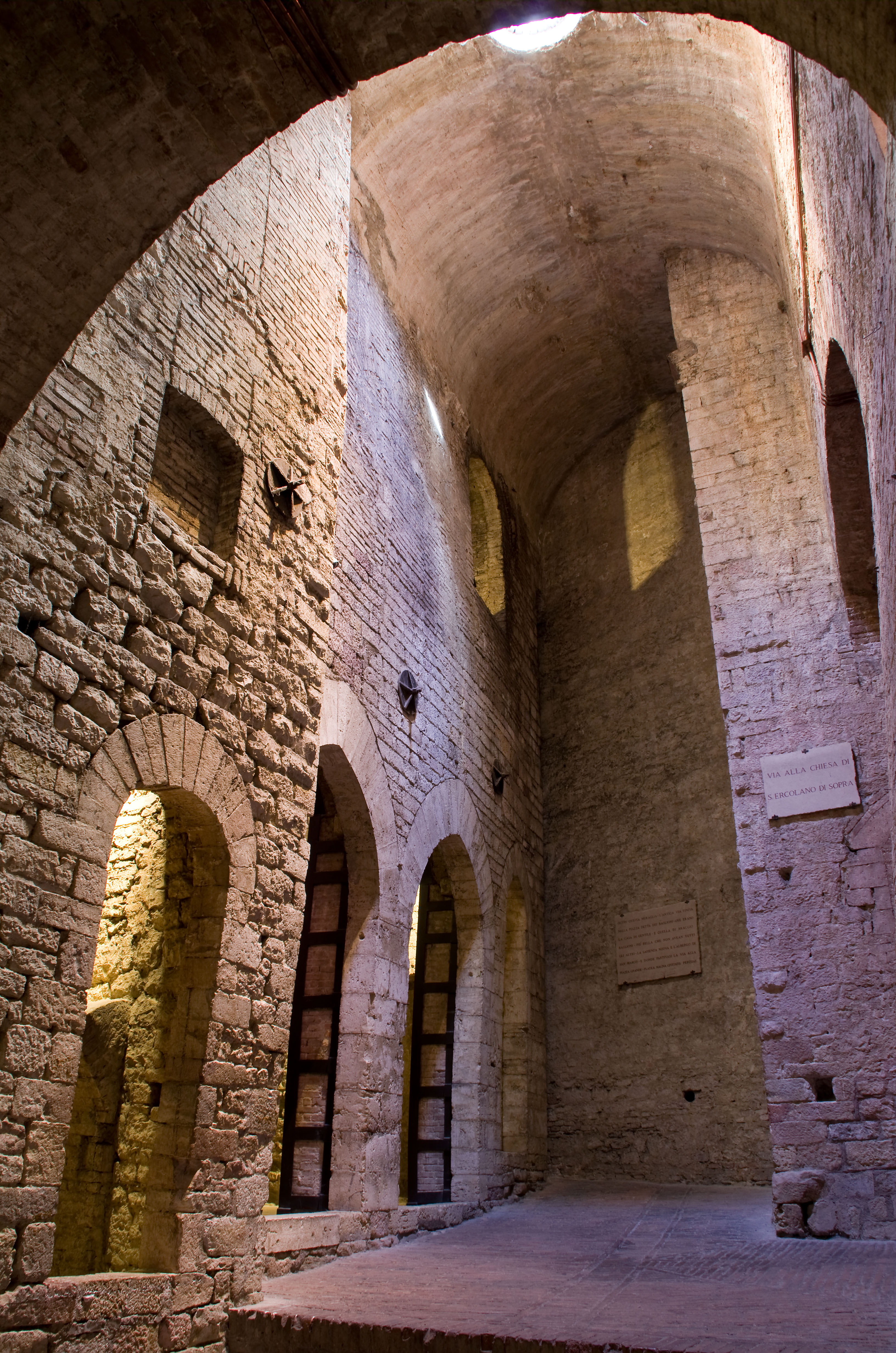 Rocca Paolina, la città sotterranea. This is a photo of a monument which is part of cultural heritage of Italy.